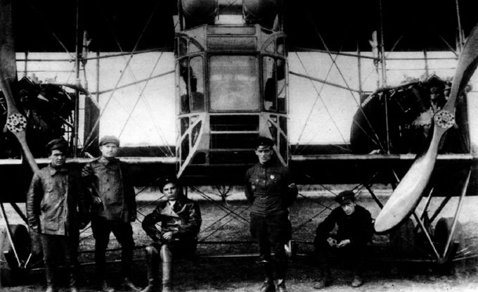 Илья Муромец № 280, в центре стоит его командир А. К. Туманский